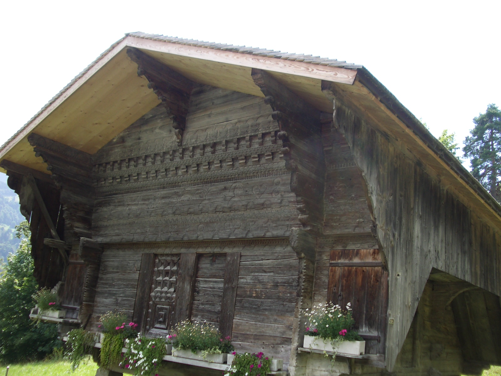 Cergnat VD, Switzerland self-made, August 2006